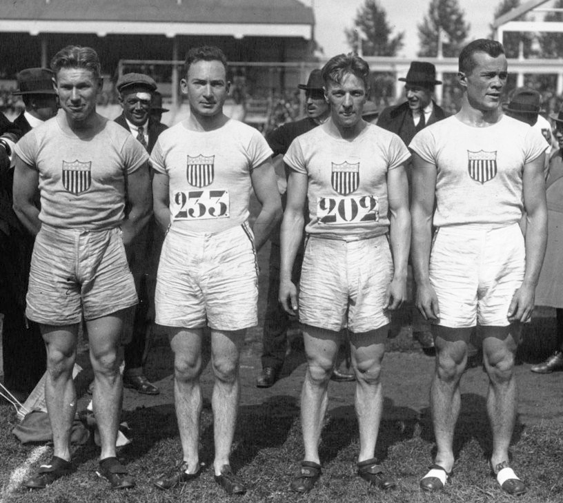 VIIes Olympiades à Anvers : équipe américaine gagnante du 400 m relais (finale) : de gauche à droite, Paddock, Scholz, Munchison, Kirskey : [photographie de presse] / Agence Meurisse